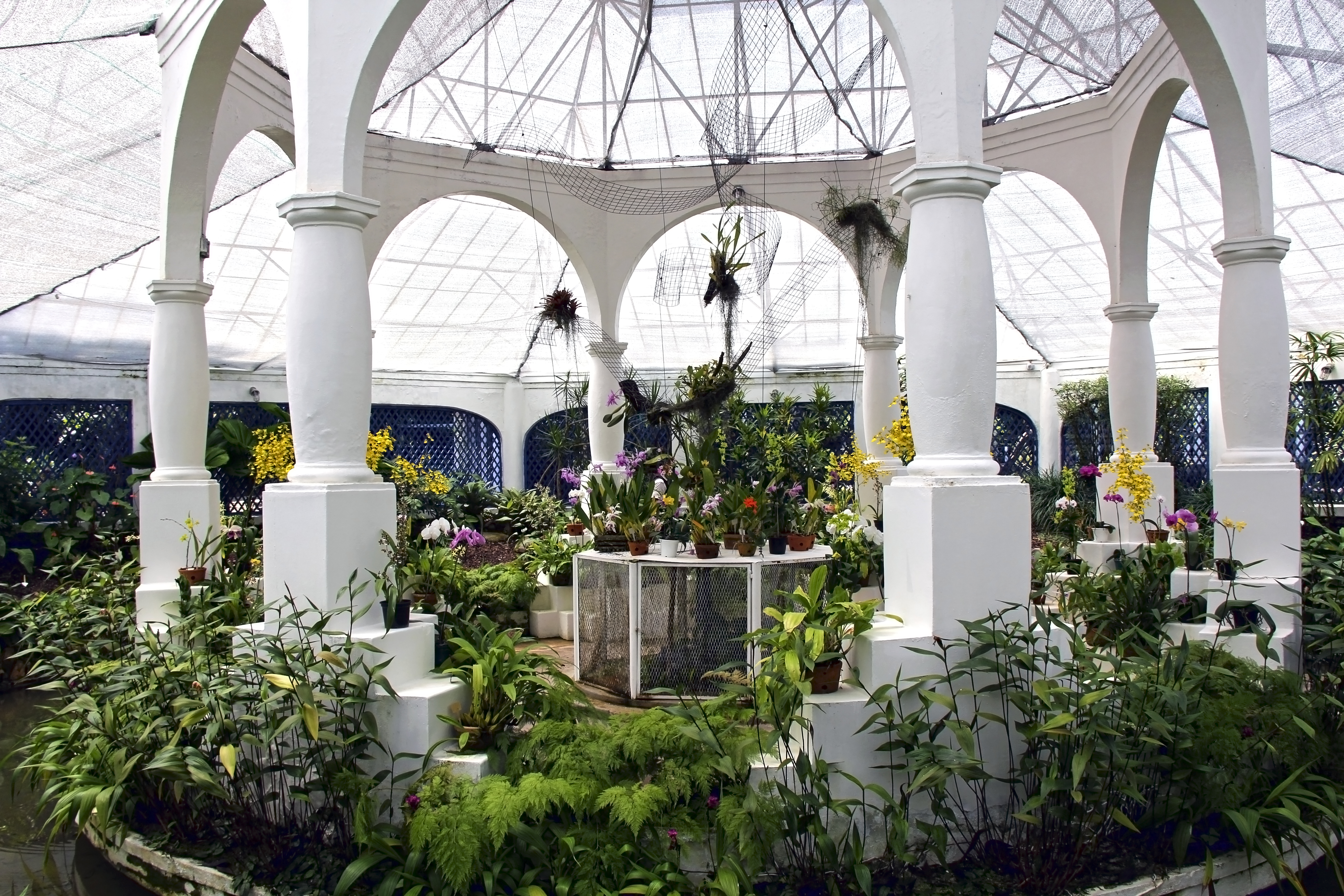 Orquidário Jardim Botânico